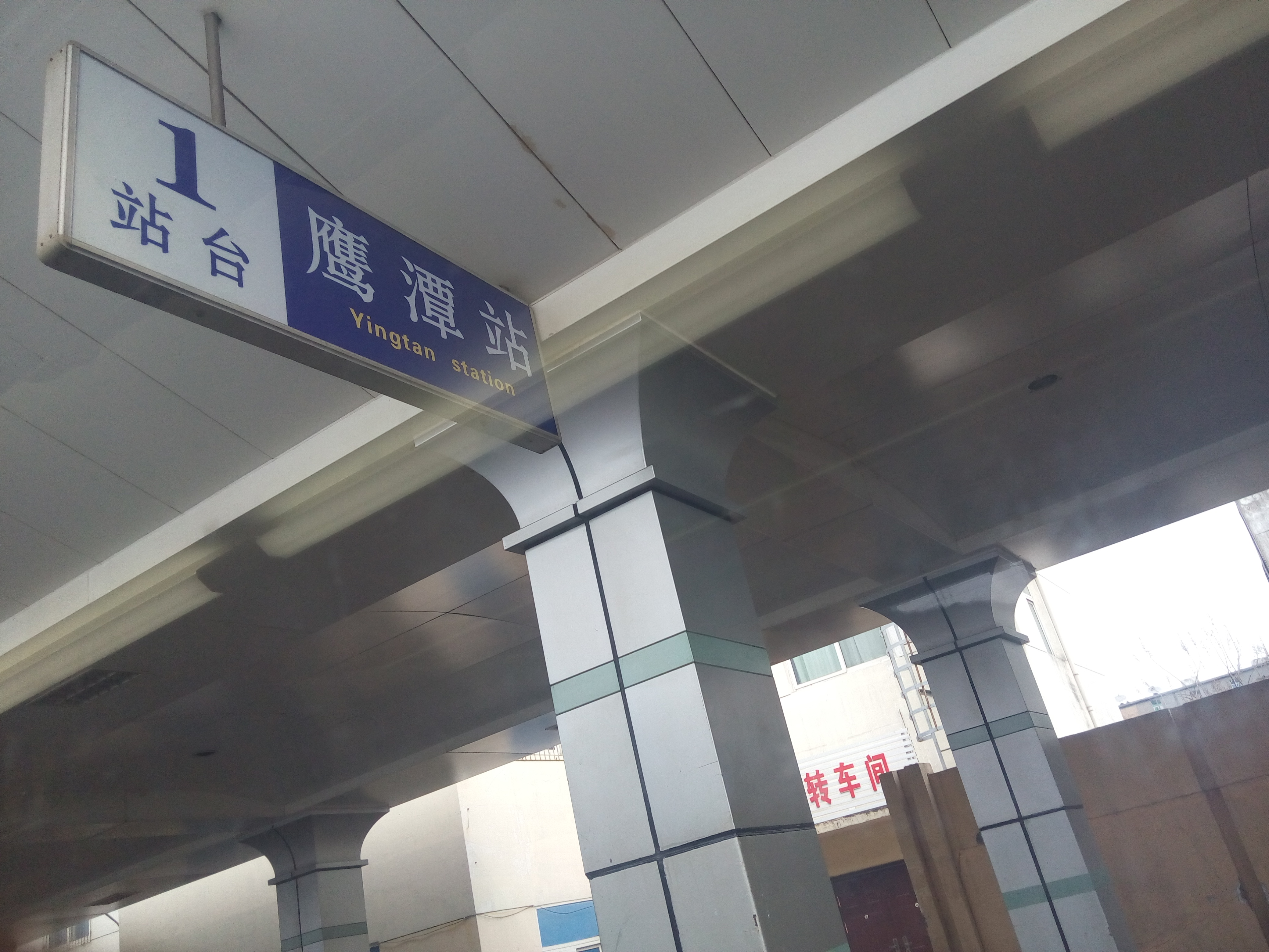 鹰潭站 1站台